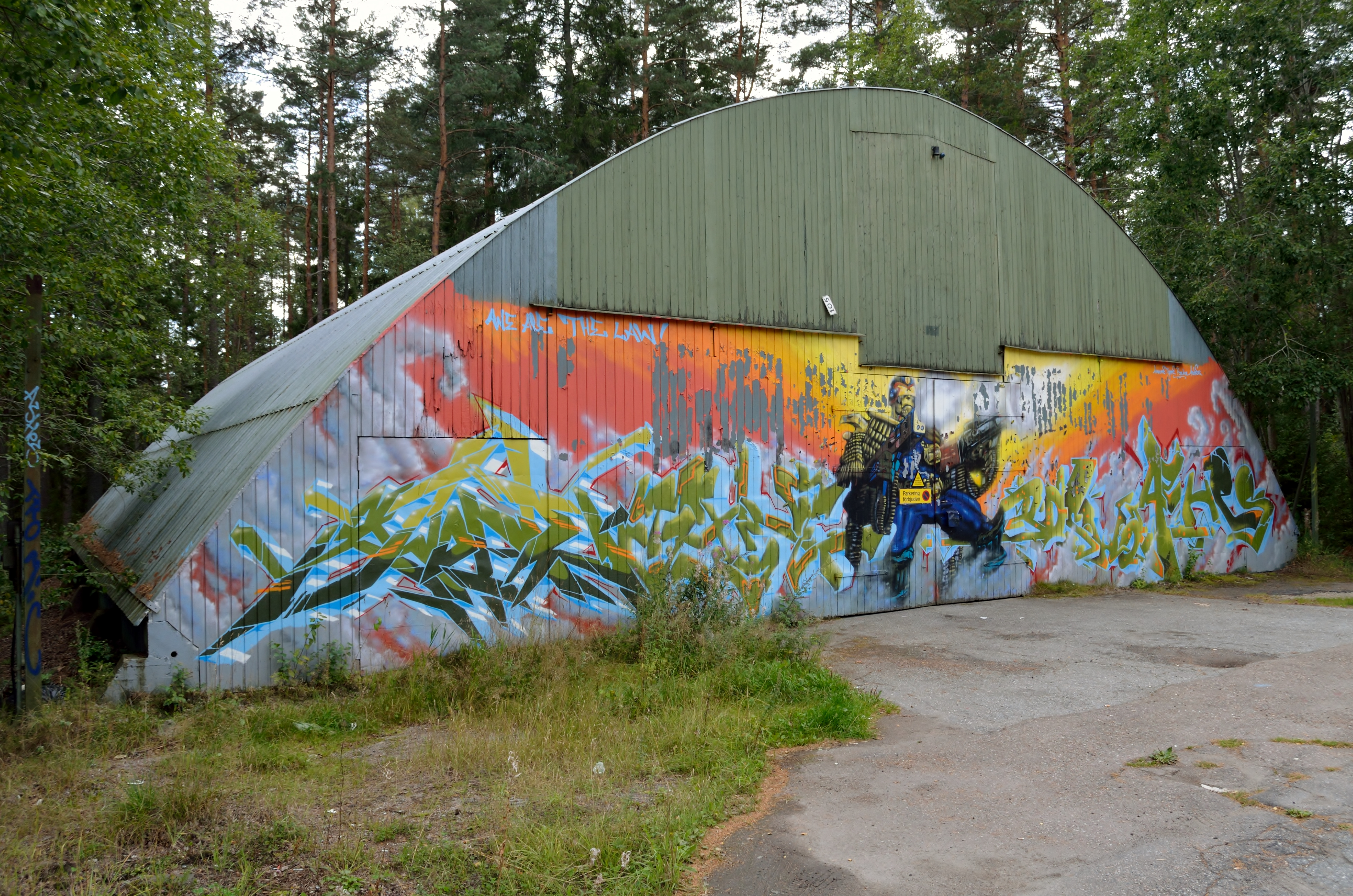 Fälthangar vid bana Bertil vid före detta Västmanlands flygflottilj i Västerås.